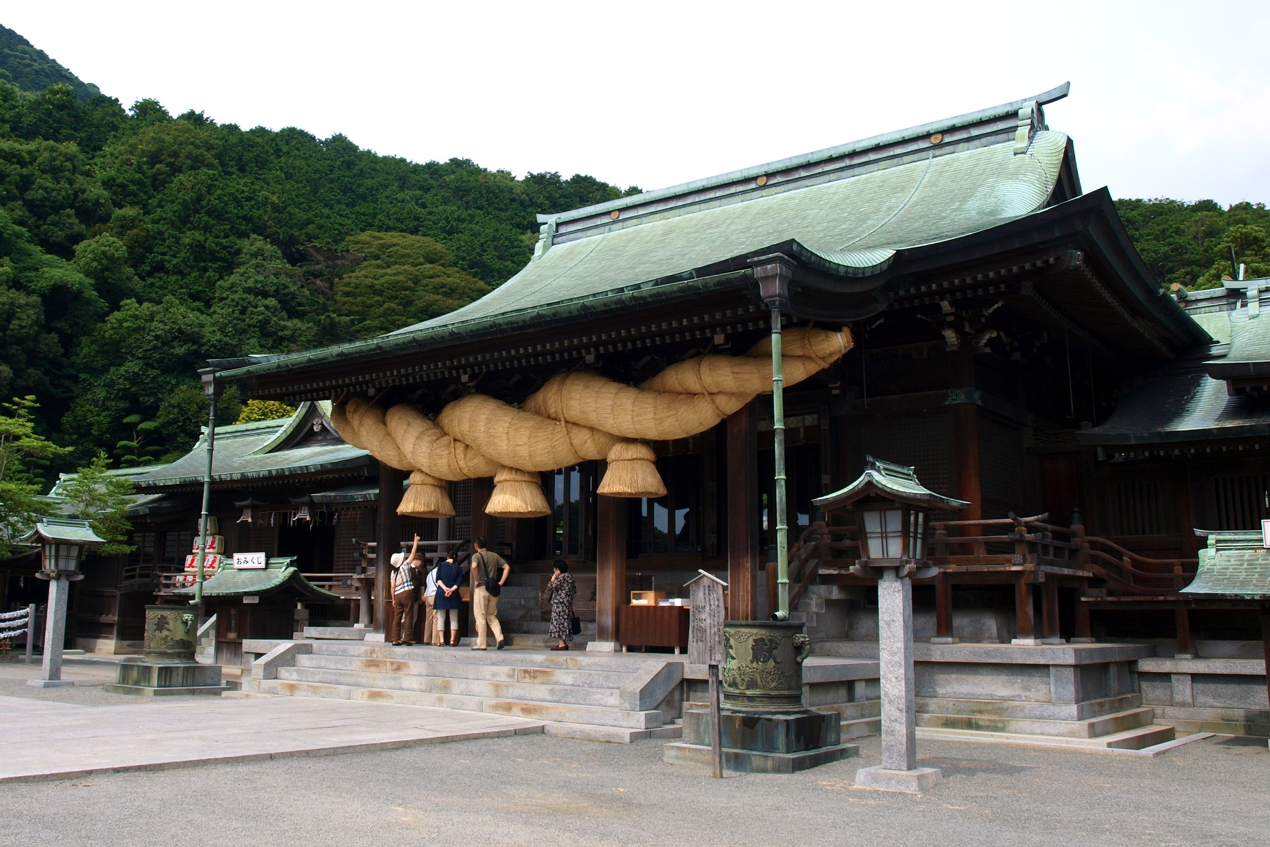 福岡県福津市の宮地岳神社の本殿。